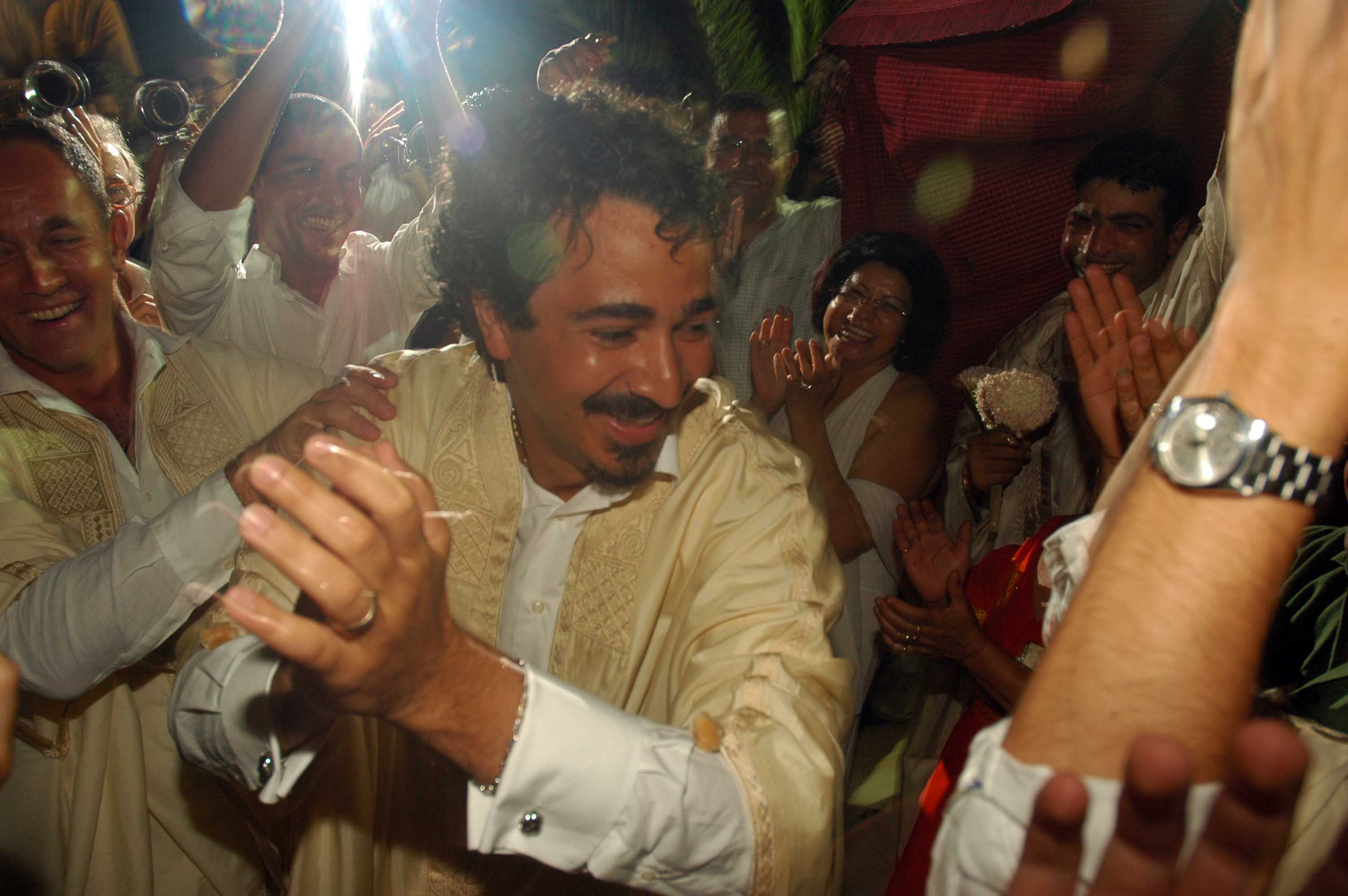 Marié célébré par ses amis le soir de la henna k'bira (mariage traditionnel à Djerba)